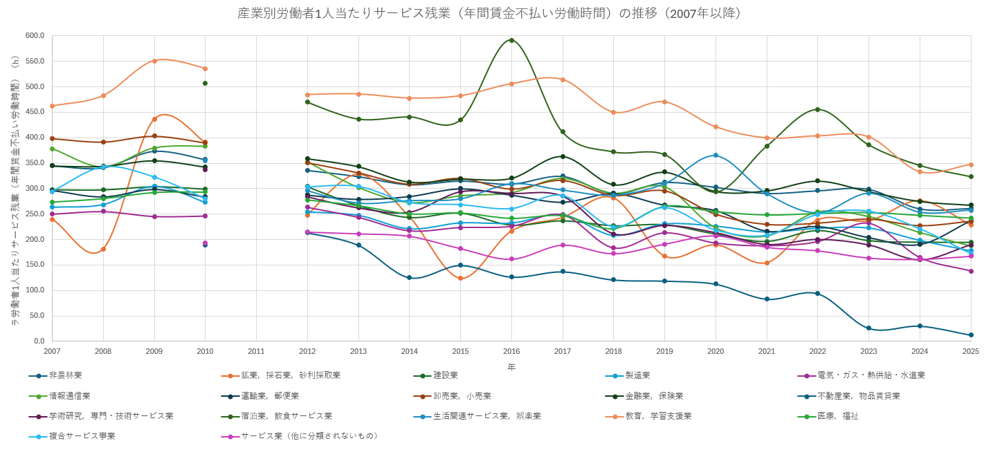 2007年以降の産業別労働者1人当たり賃金不払い労働時間の推移